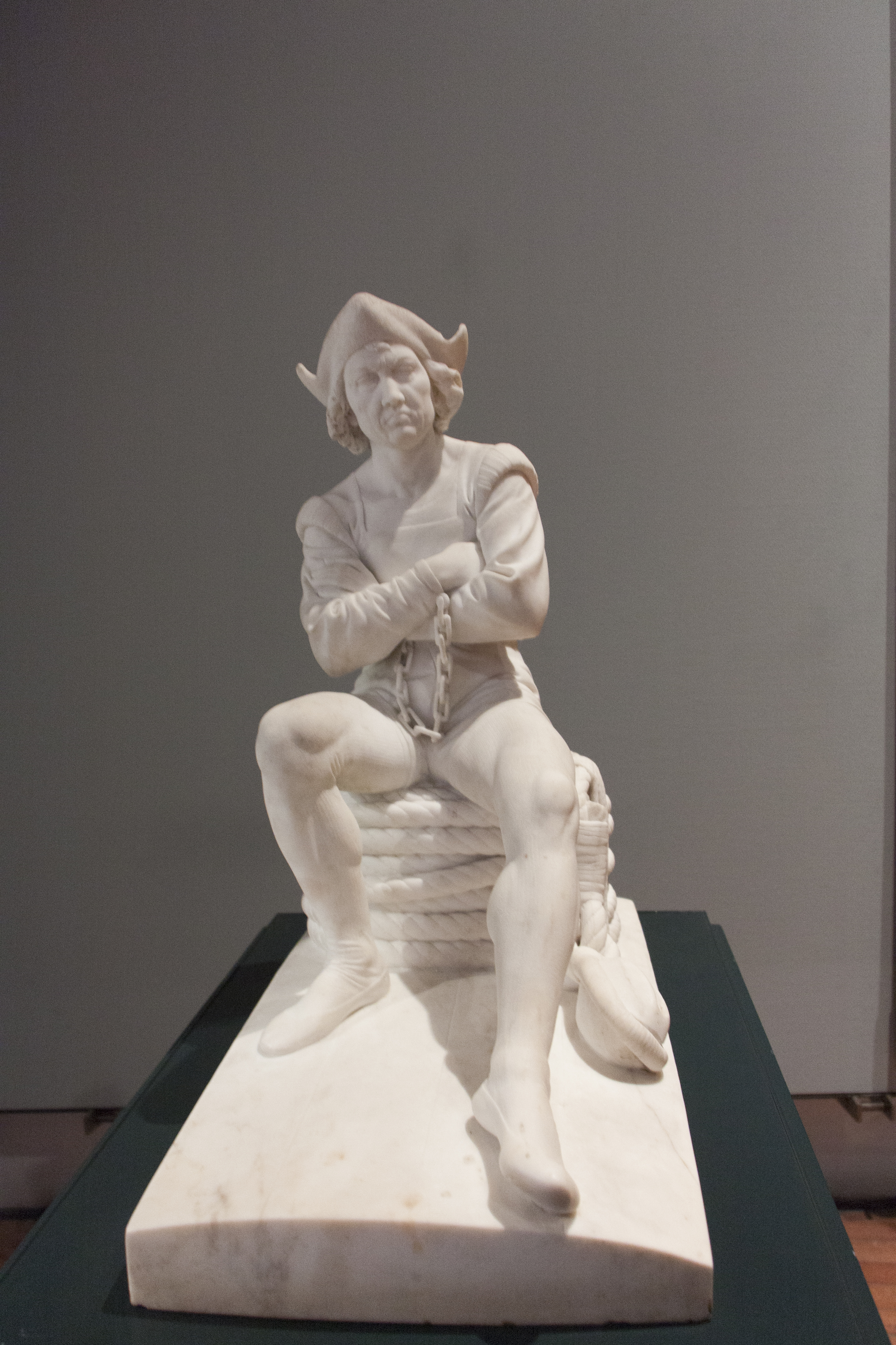 Cristoforo Colombo in catene - Benedetto Delisi marmo 1872